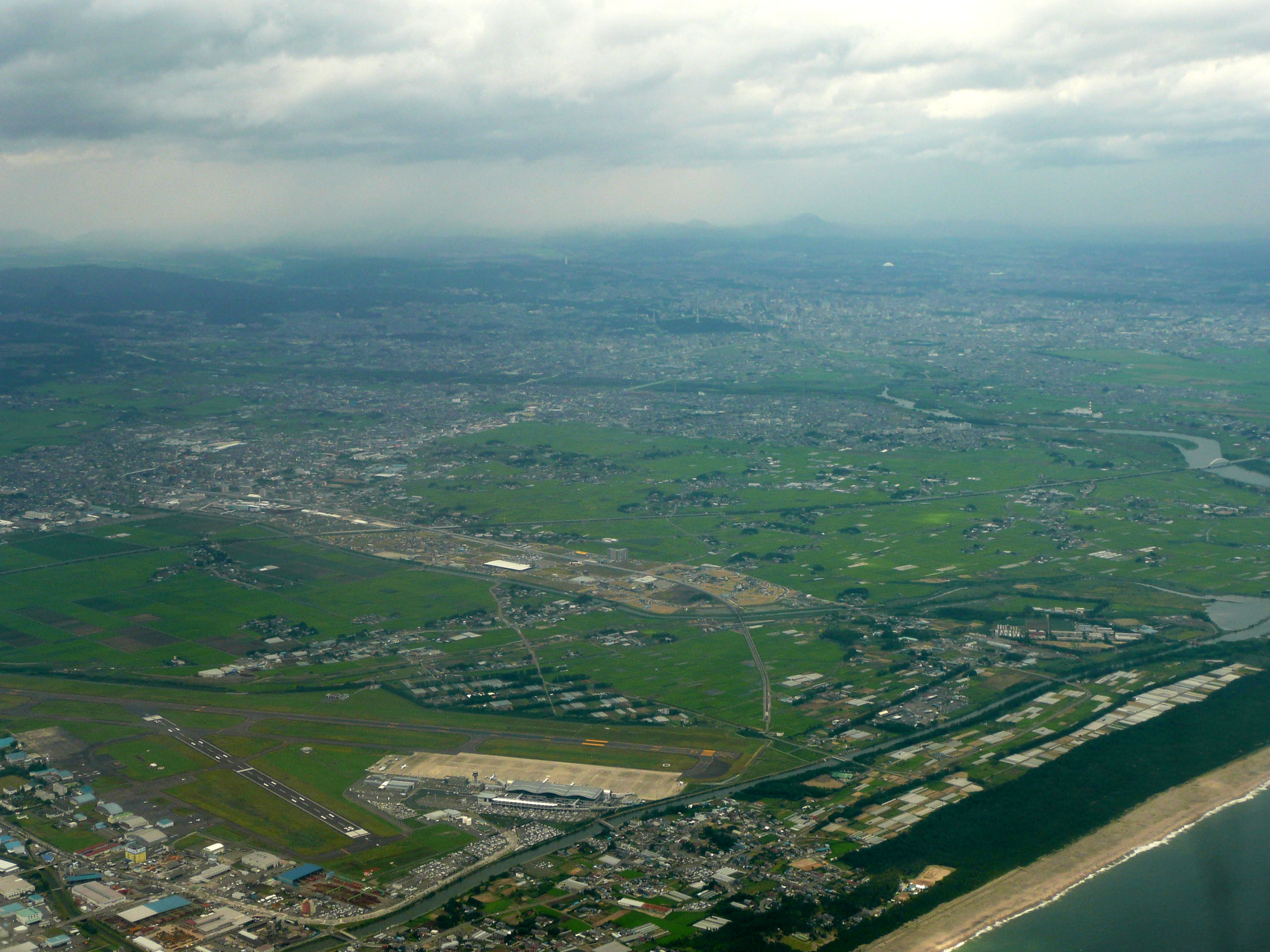 仙台平野・手前仙台空港・貞山運河空撮画像。